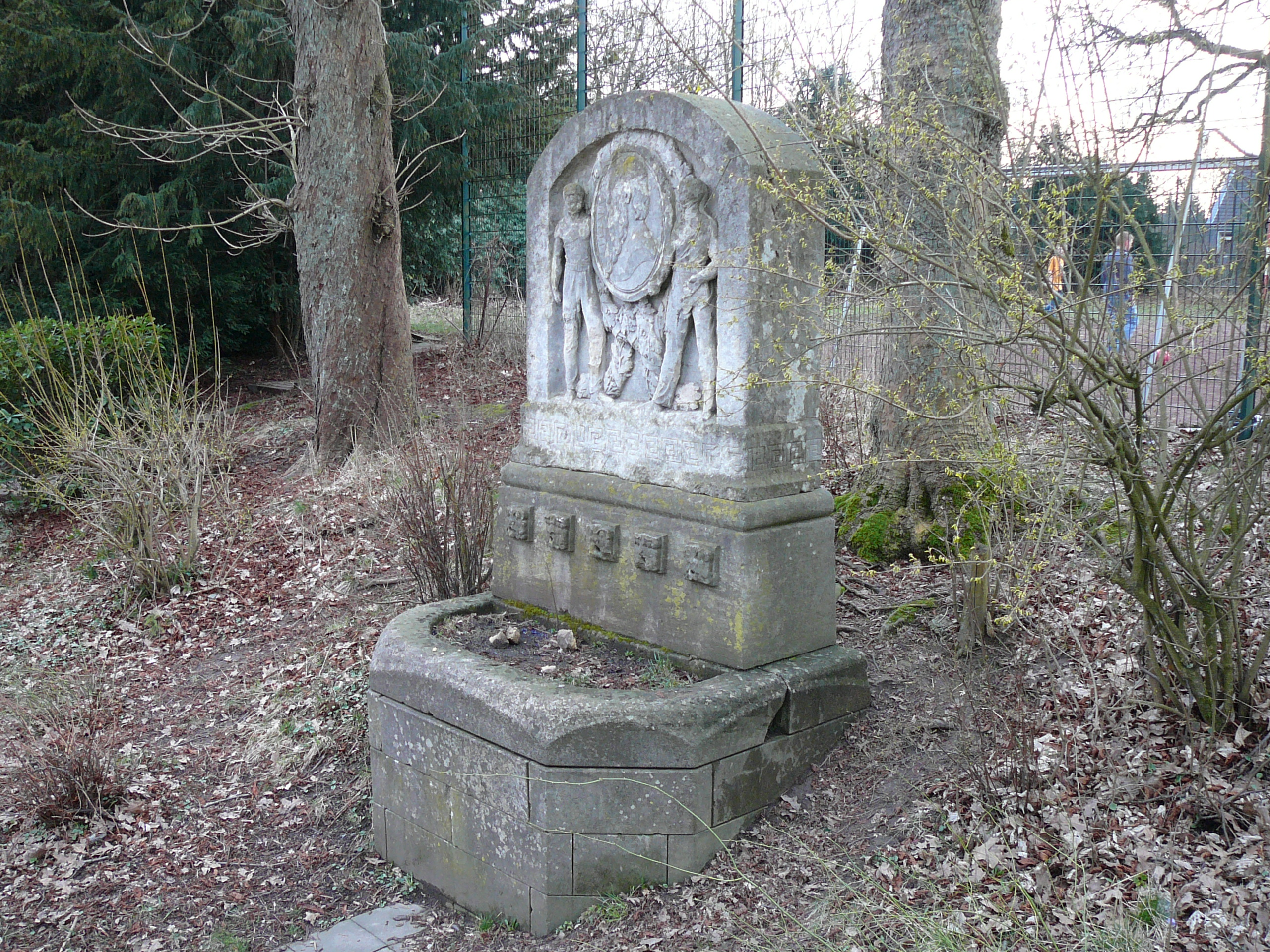 Jahn-Brunnen, Scheidtstr, Wuppertal